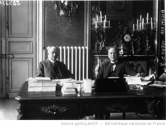 Rakovski y Chicherin en la embajada soviética en París en 1925.